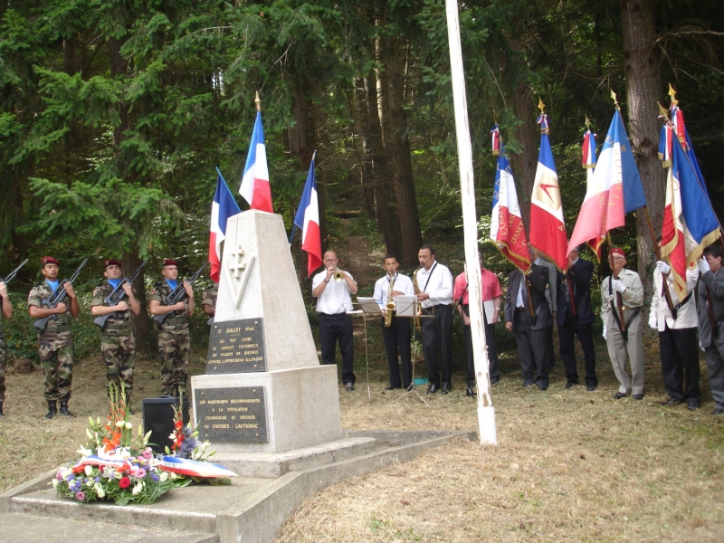 64ième anniversaire.